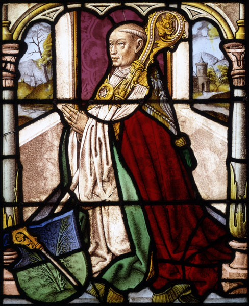 Pierre de Leyde, Pieter Blommenveen, Pierre Blomevenna, Petrus Blomevenna O.Cart. (1466-1536) prieur de la chartreuse de Cologne, auteur ascétique. Vitrail XVIe sècle.